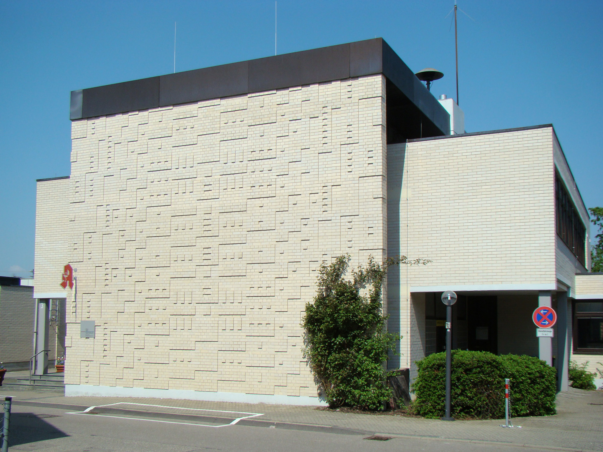 Fassadendetail am Bürgerbüro in Heilbronn-Biberach